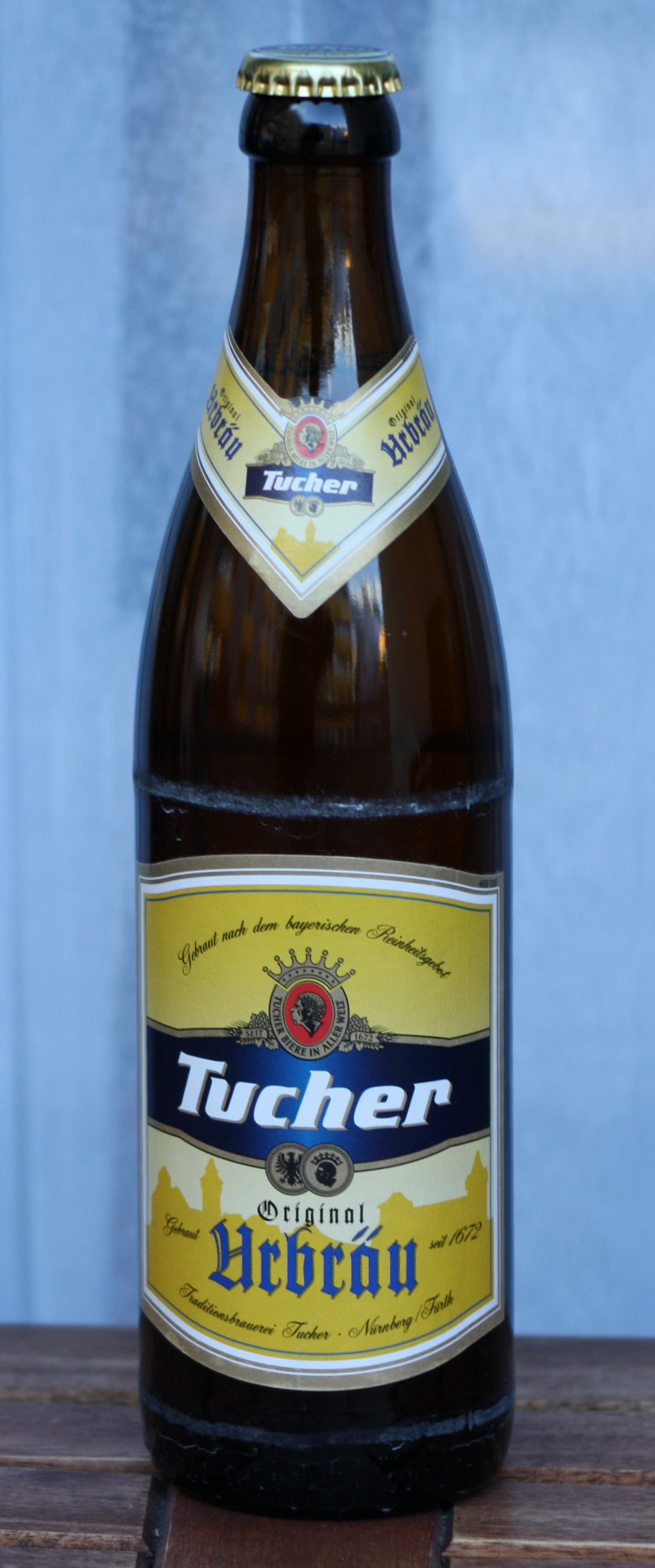 Bierflasche - Tucher Helles, Tucher Brauerei, Alc. 5,2 % vol